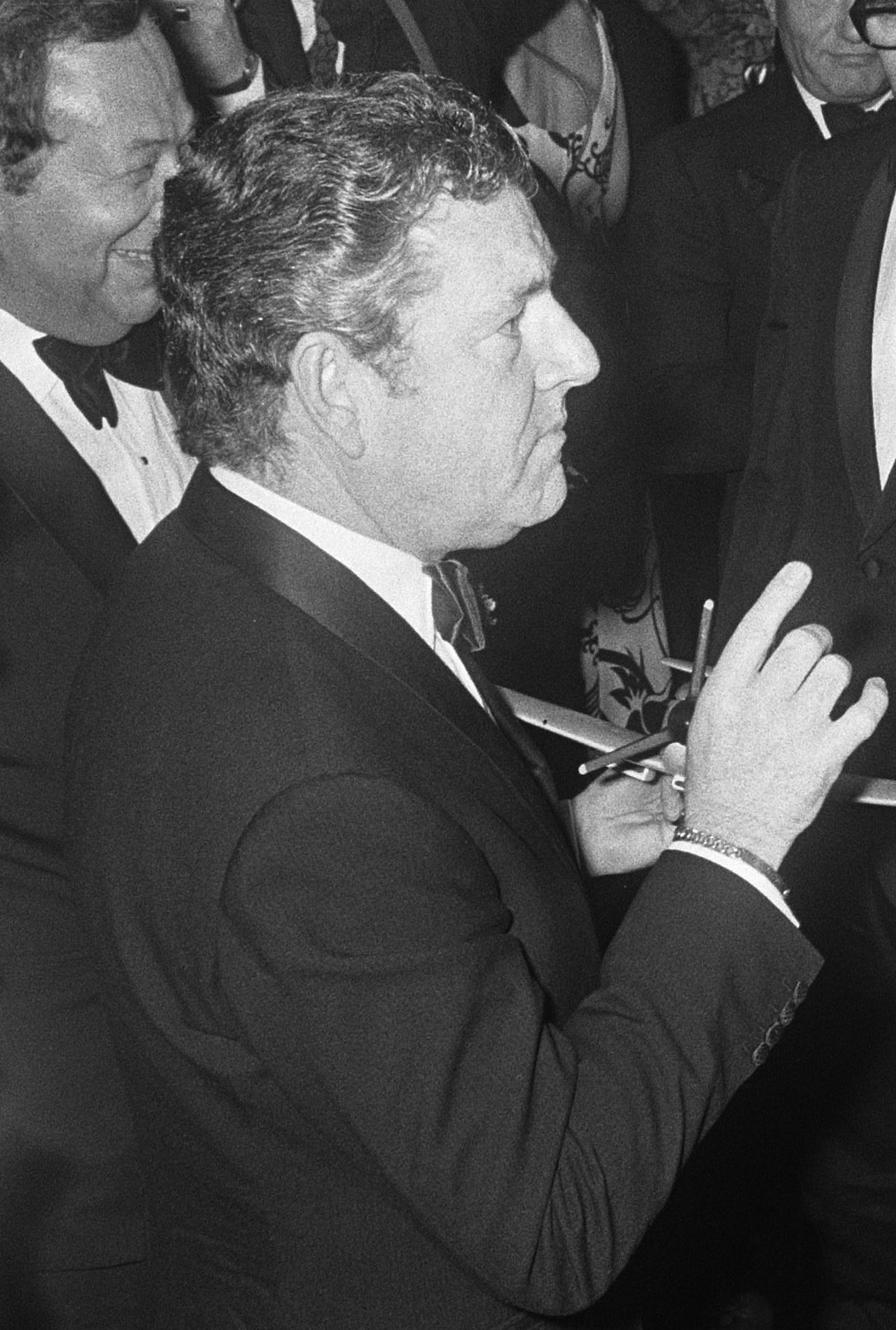 Koningin Juliana en prins Bernhard wonen de Nederlandse galapremière bij van film Battle of Britain in het Tuschinski Theater in Amsterdam. De Engelse acteur Kenneth More biedt prins Bernhard en koningin Juliana een model van een Spitfire aan